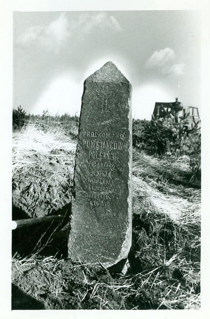 Беларуская (тарашкевіца): Помнік на магіле ўдзельнікаў паўстаньня 1863—1864 гадоў каля в.Ласасін. Існаваў у 1928-1940(?) гг., і 1989-1998 гг.